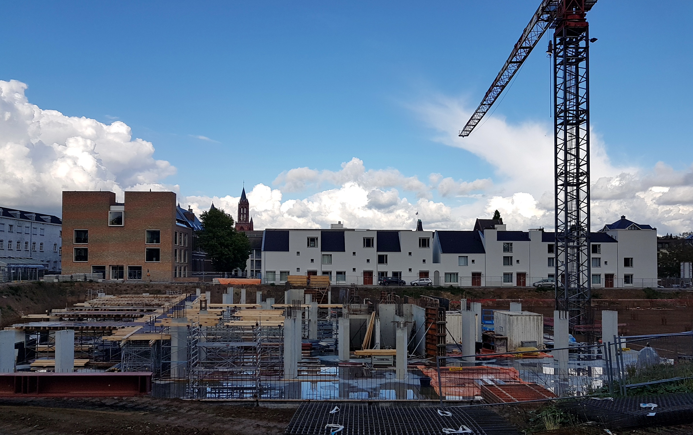 Bouw van drie appartementencomplexen op het Klevarieterrein in het Kommelkwartier in Maastricht.